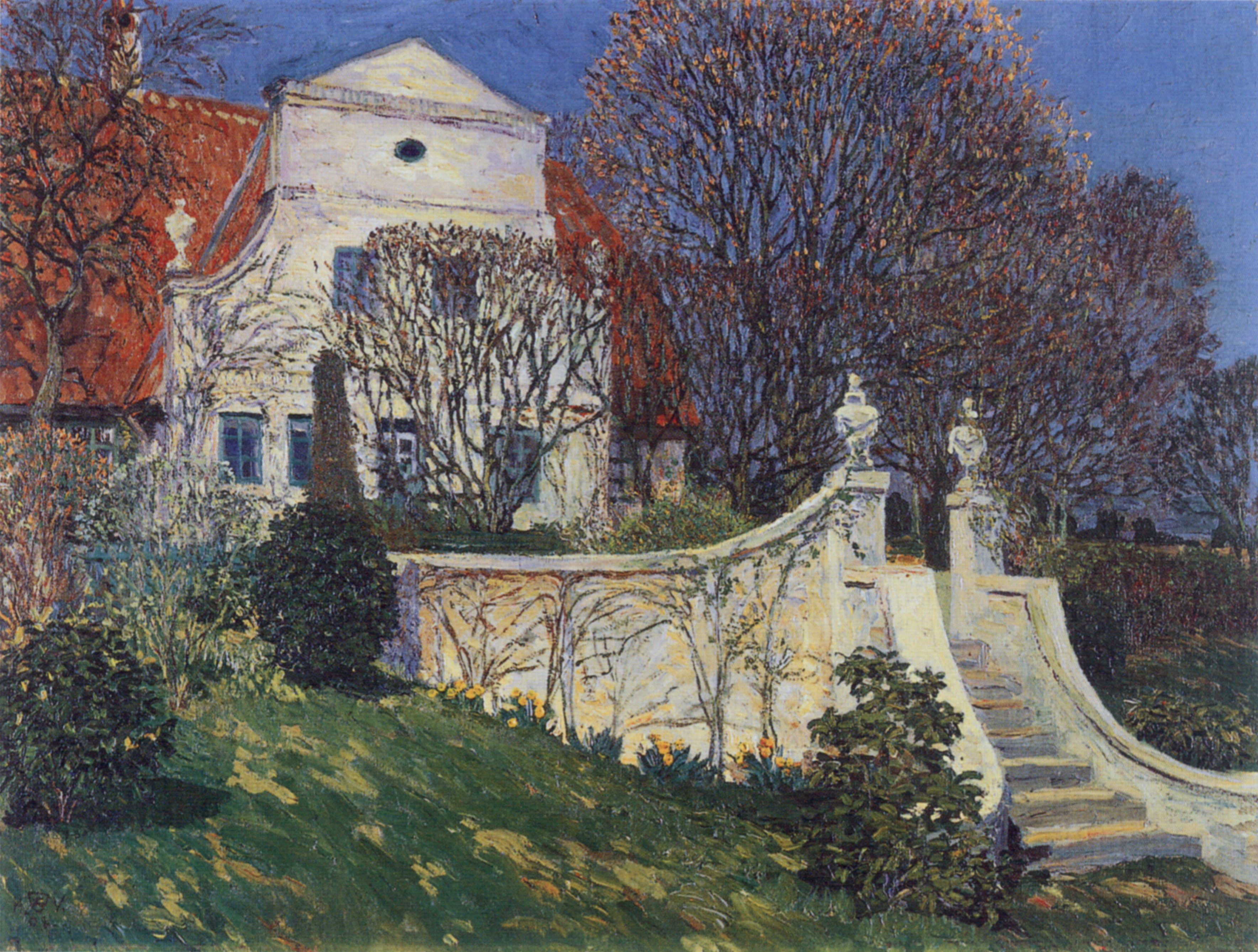 Der Barkenhoff. Öl auf Leinwand. 45,5 x 60,5 cm. Privatbesitz